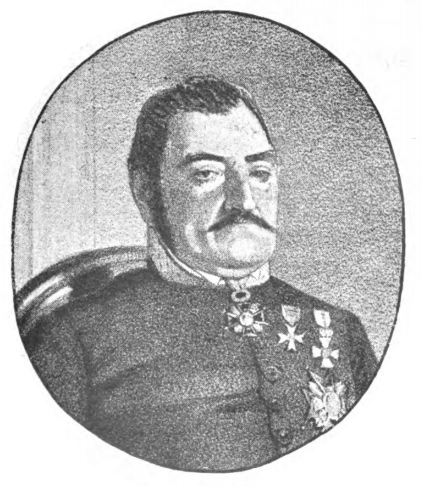 Ros de Eroles